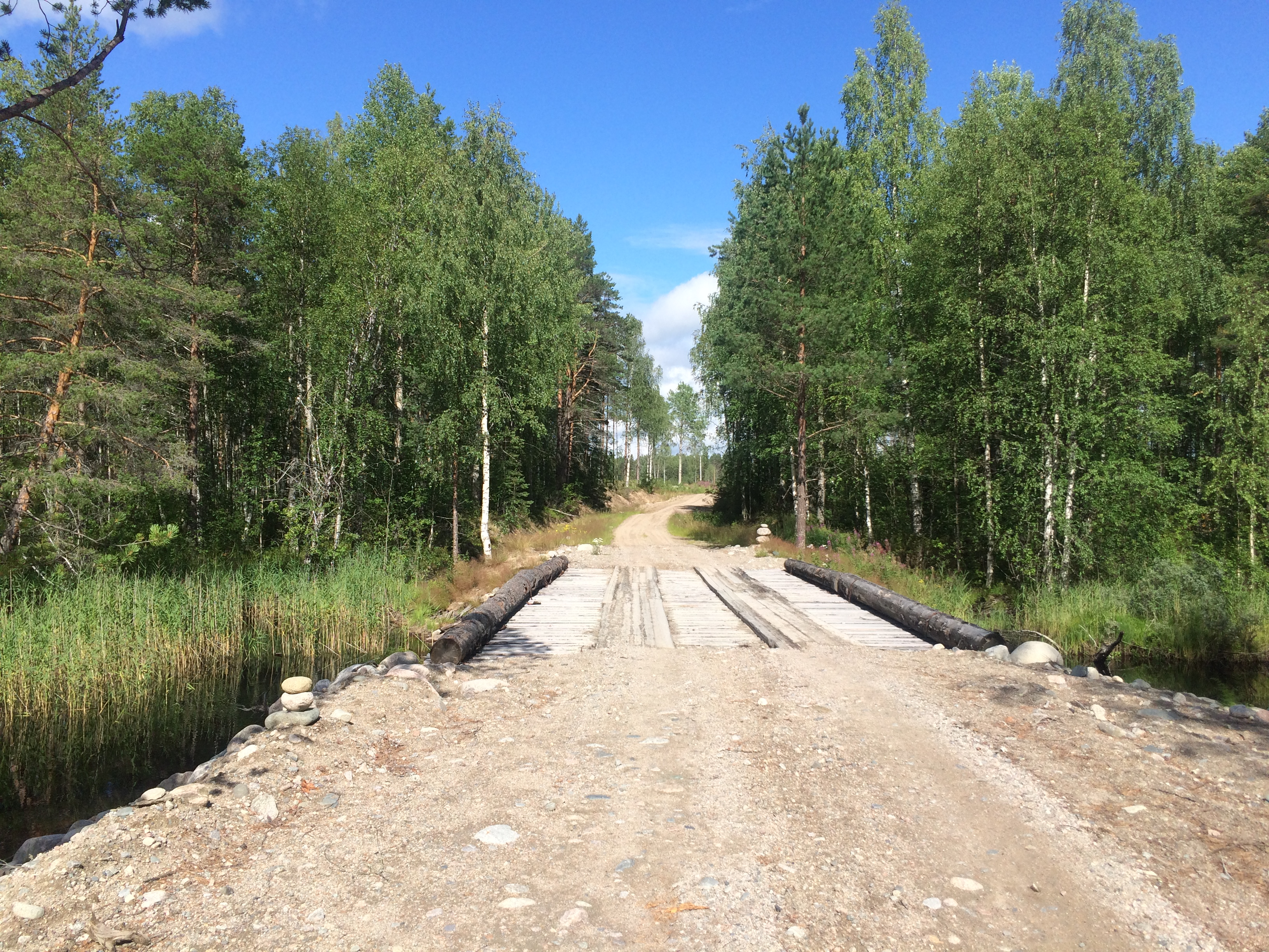 Судак (река, впадает в Сямозеро)